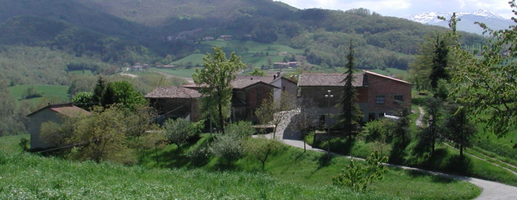 Carpineti, Italy, appennino reggiano, Busanella